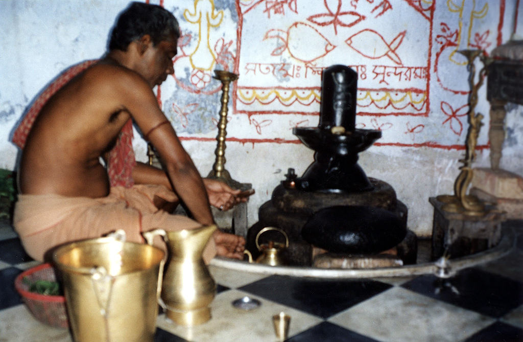 Priester bei Lingam-Puja in einem Shiva-Tempel